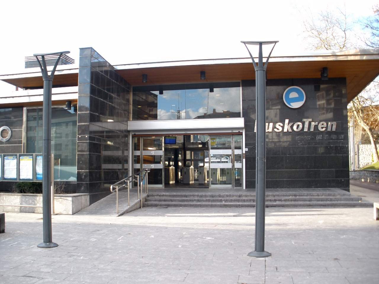 Estacion de Lasarte-Oria (Gipúzkoa), operada por EuskoTren